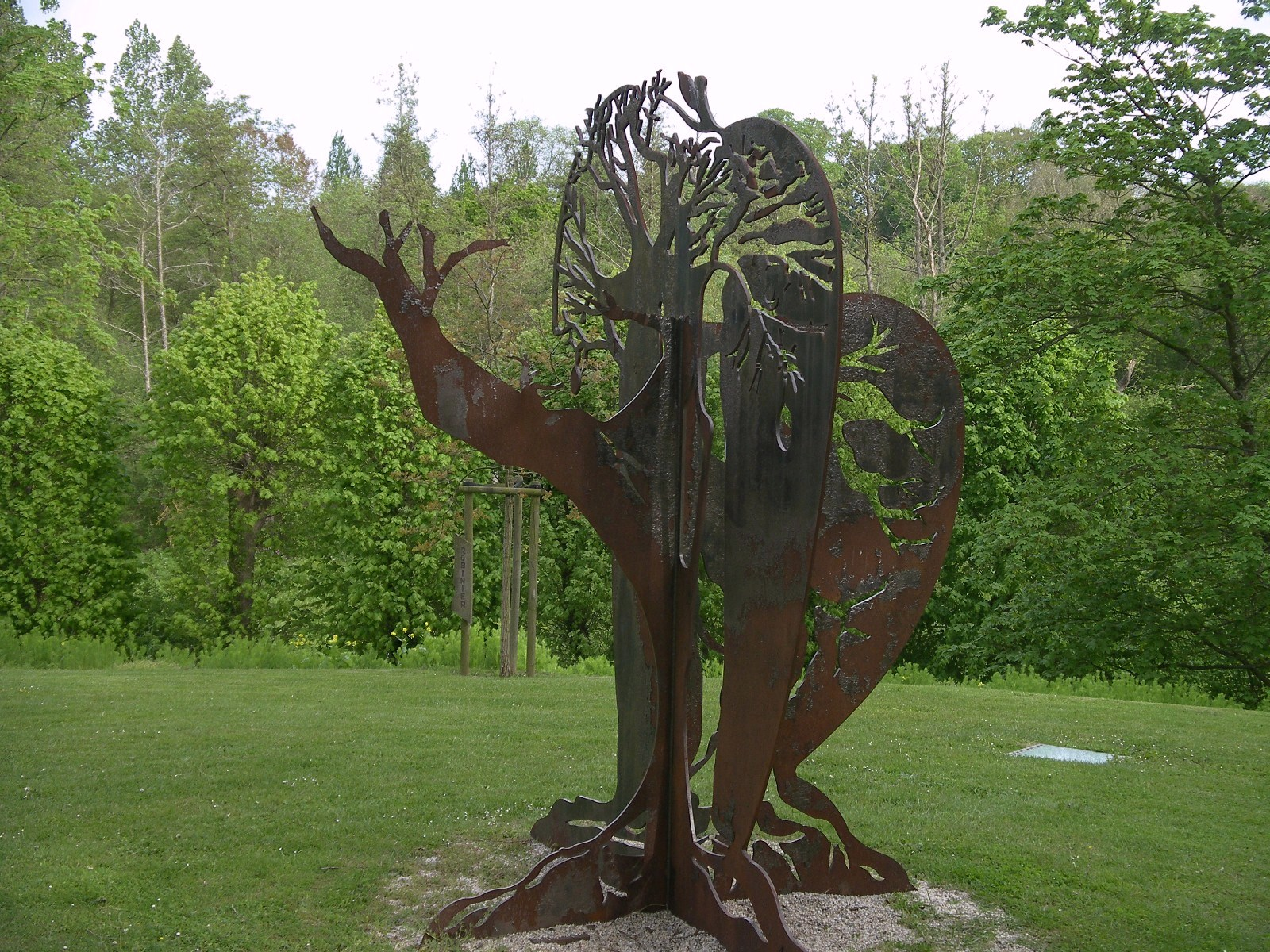 "Le Baobab et le Pommier" en hommage à Léopold Sédar Senghor sculpture de Anne Deshaies (5 octobre 2006) à Verson (Calvados)